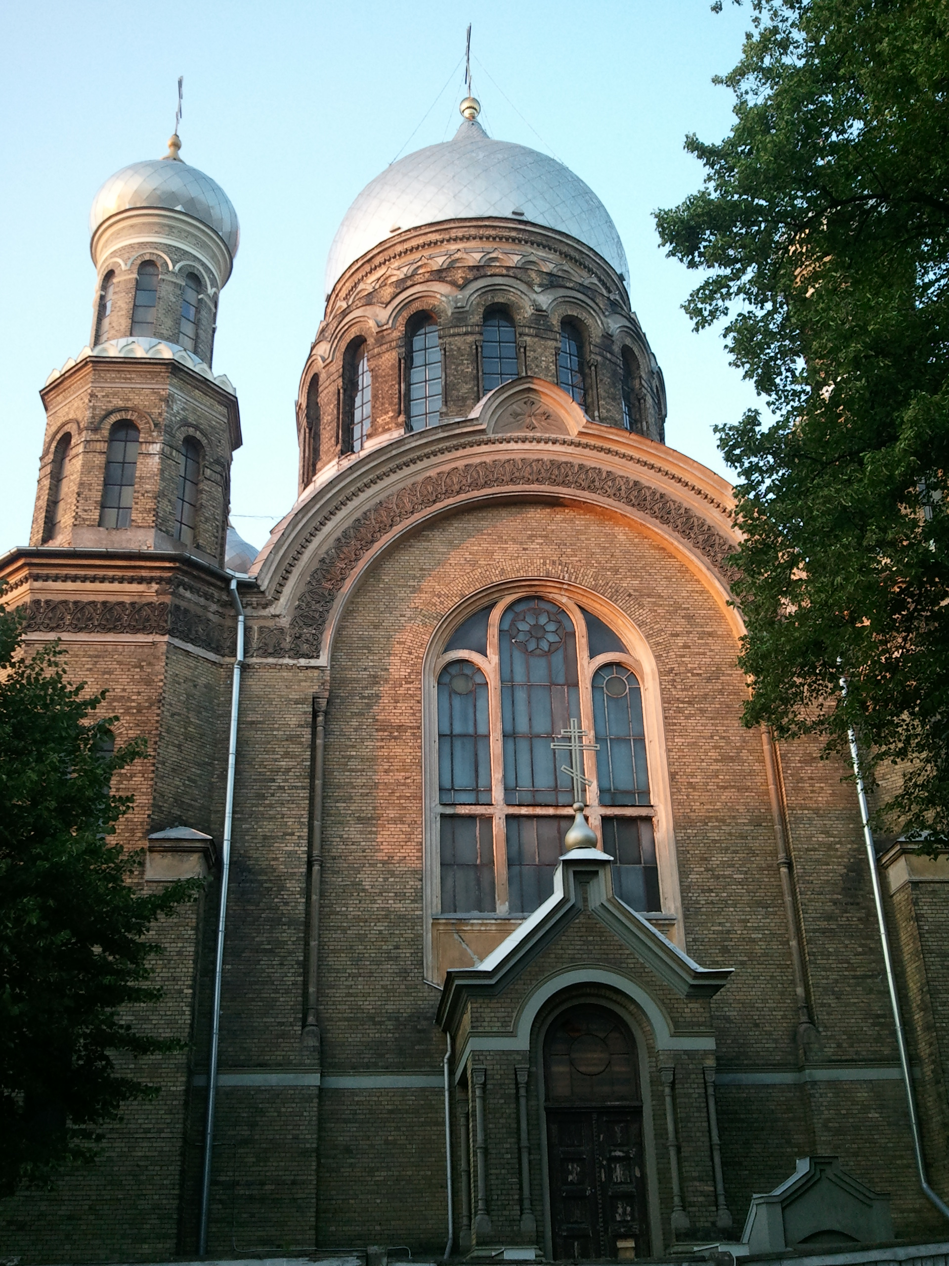 Rīgas Svētās Trīsvienības Pareizticīgo sieviešu klostera baznīca